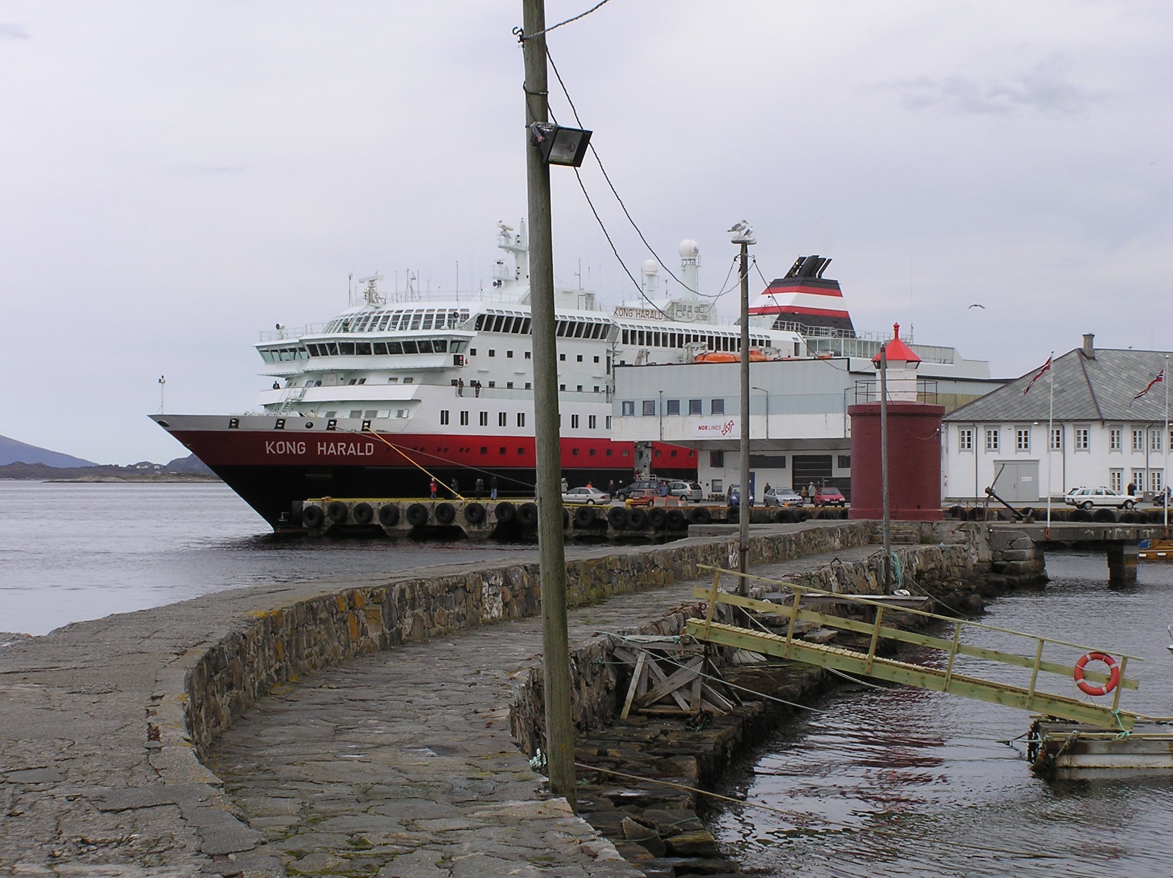 Ålesund, Hurtigroutenschiff Kong Harald